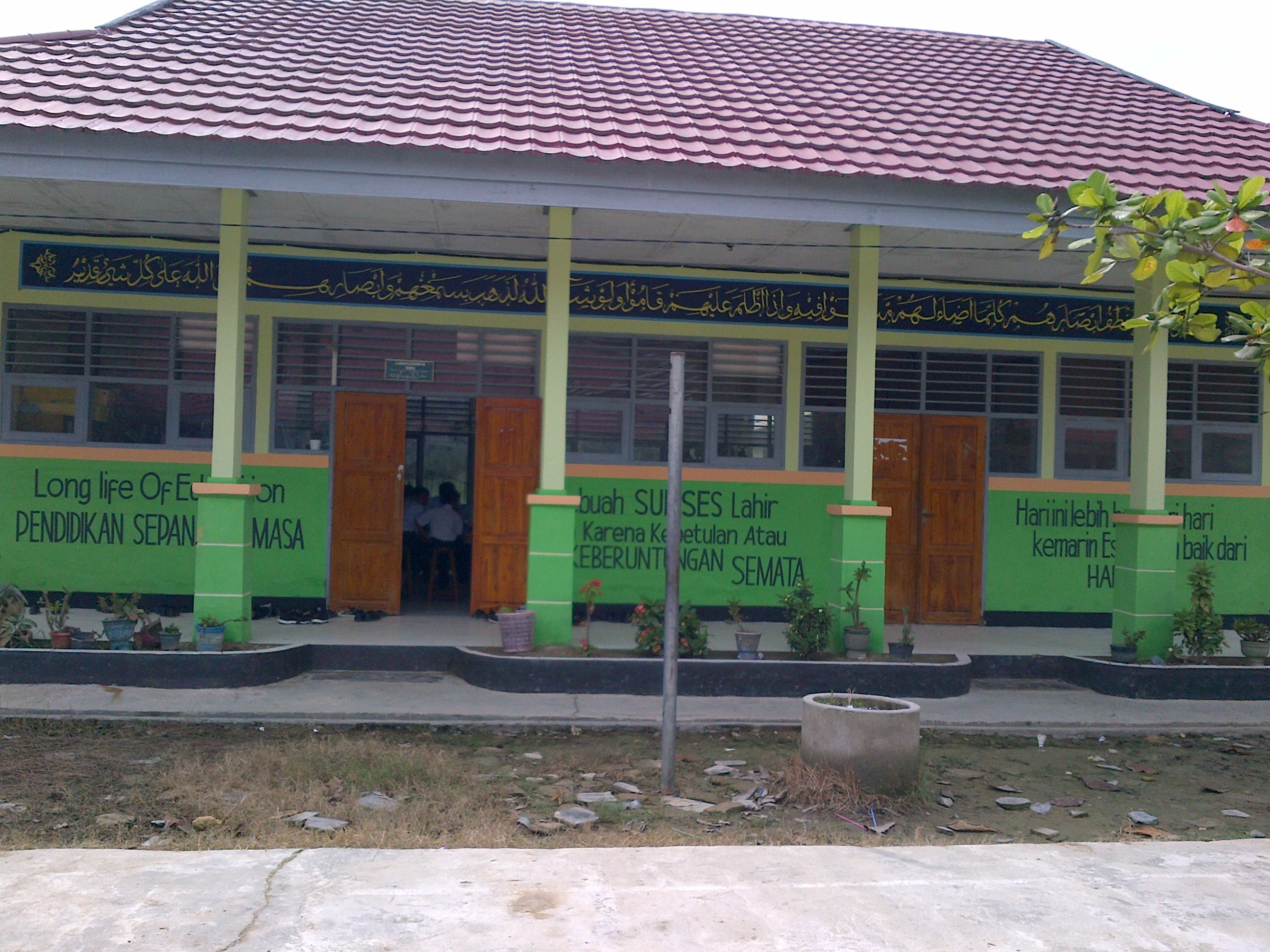 Laboratorium IPA setelah dicat ulang dan diperbaiki.